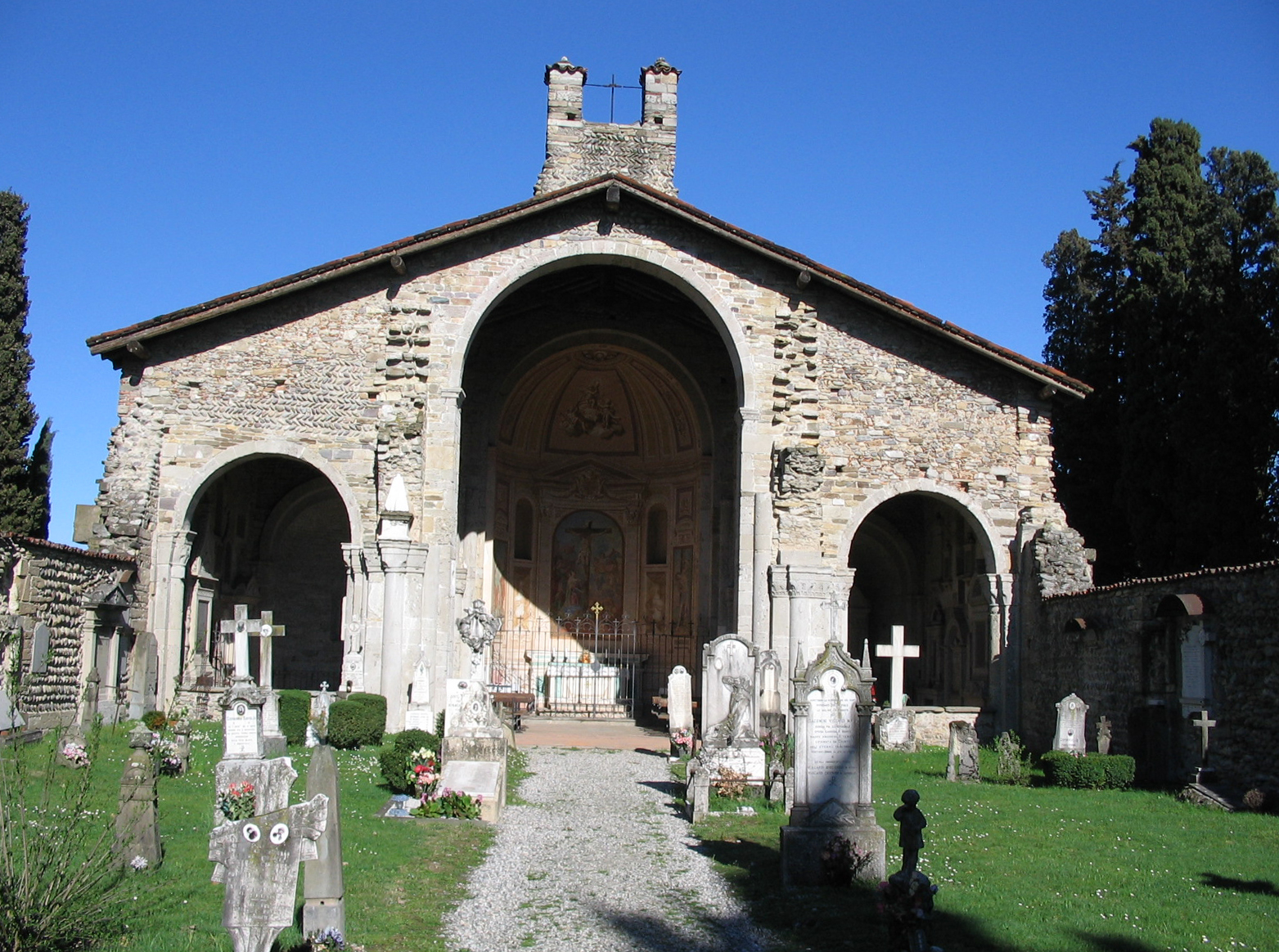 Basilica di Santa Giulia, abside superstite, nel comune di Bonate Sotto.